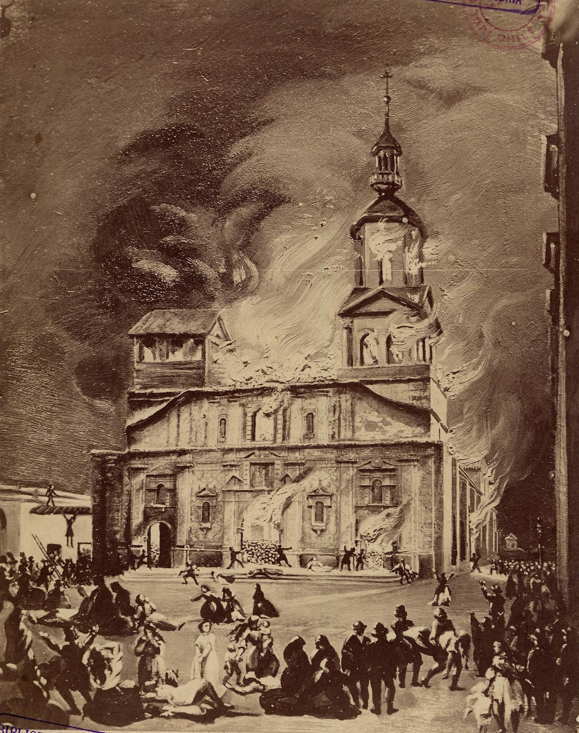 Incendio de la Iglesia La Compañía de Jesús, 8 de diciembre de 1863, Santiago. Dedicada a la Biblioteca Nacional por Luis Montt